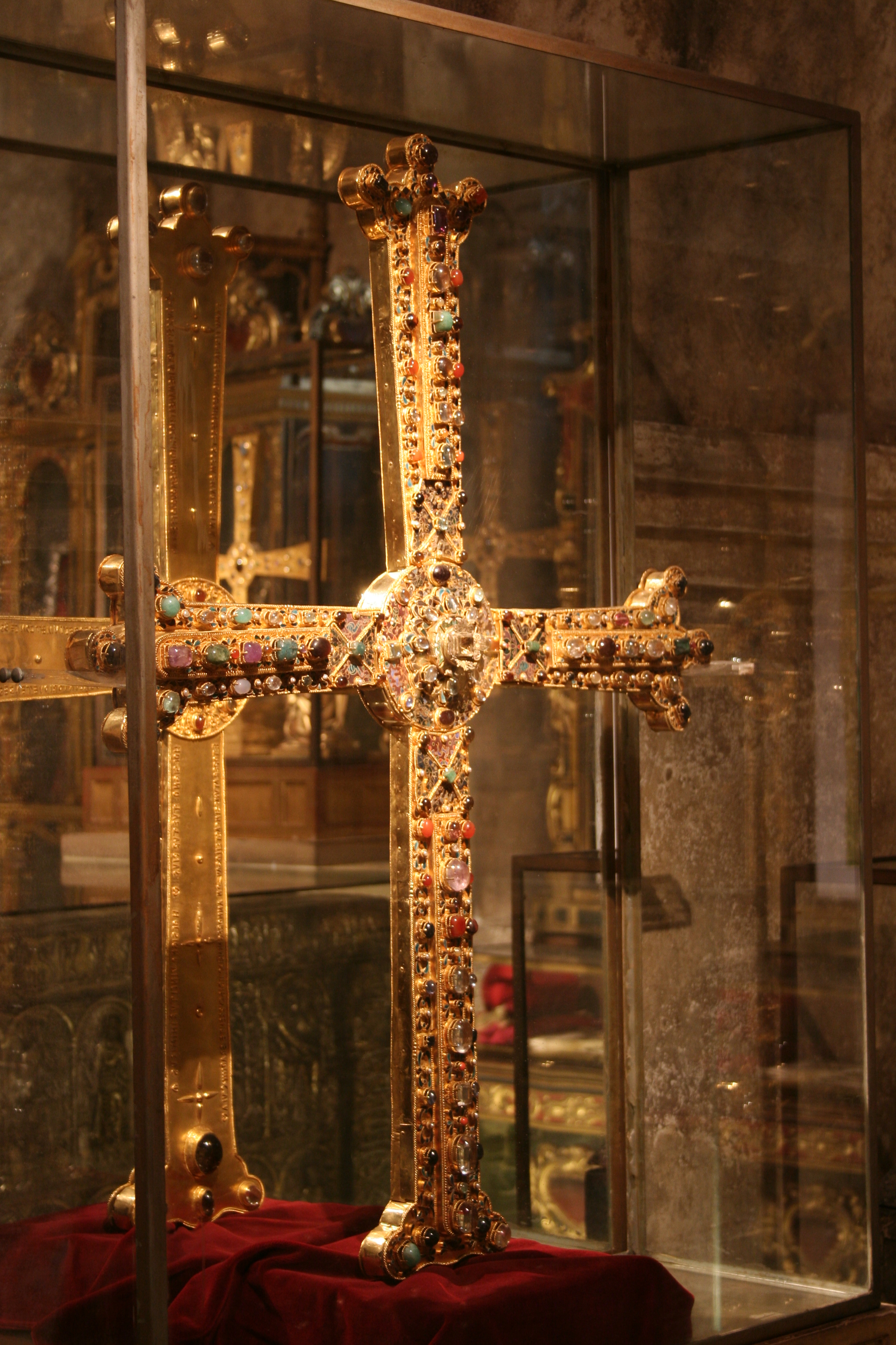 Cruz de la Victoria, conservada en el interior de la Cámara Santa de Oviedo.